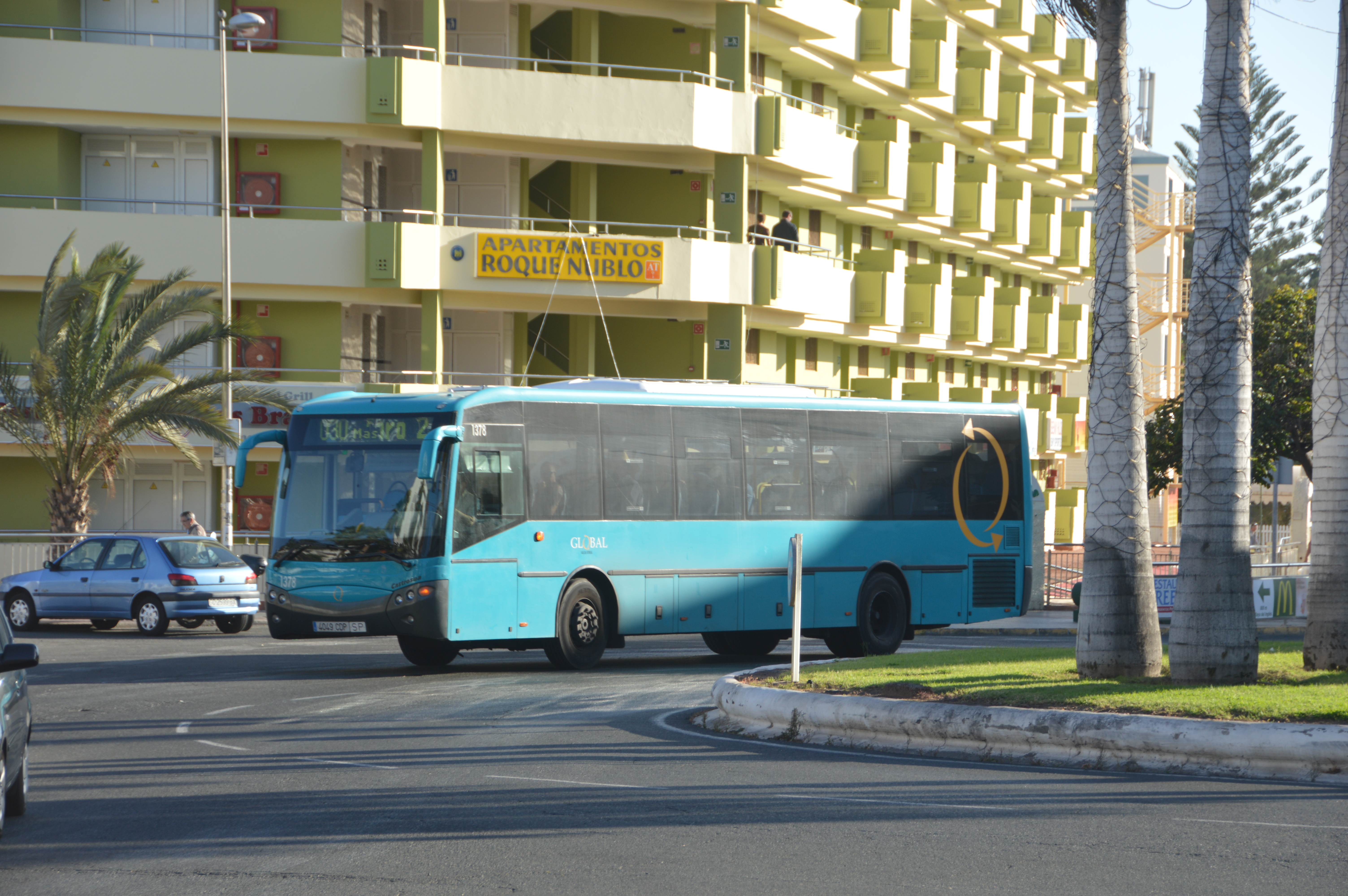 Description